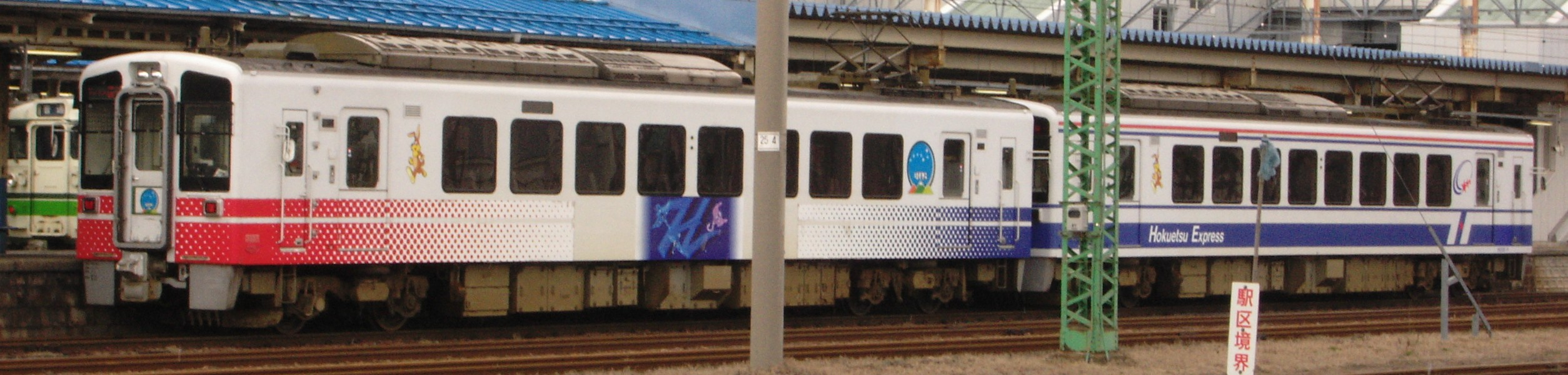 北越急行HK100形電車